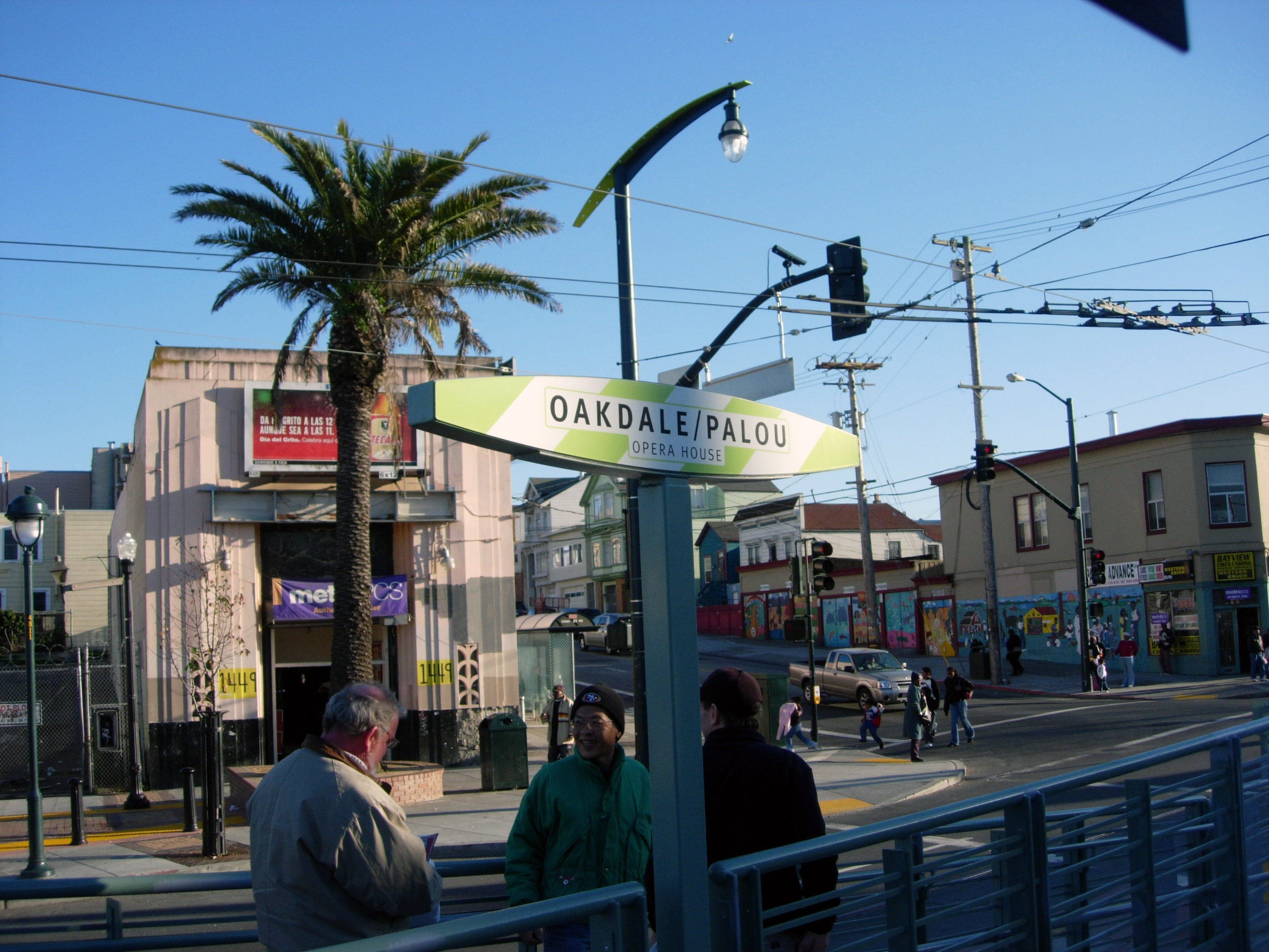 Sign at Oakdale/Palou Avenue Station, San Francisco